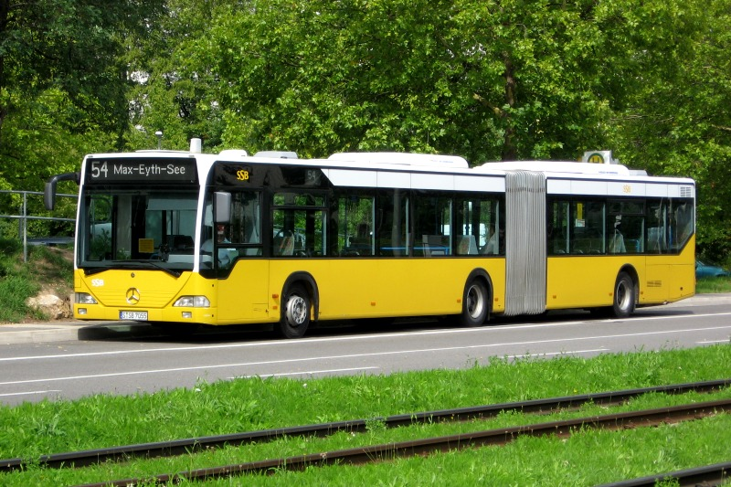 Mercedes-Benz Citaro G (Bj. 2002) in Stuttgart-Neugereut; Stuttgarter Straßenbahnen, Wagen Nr. 7055 eigenes Foto (September 2006) / alle Rechte freigegeben